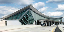 Buffalo Niagara Airport